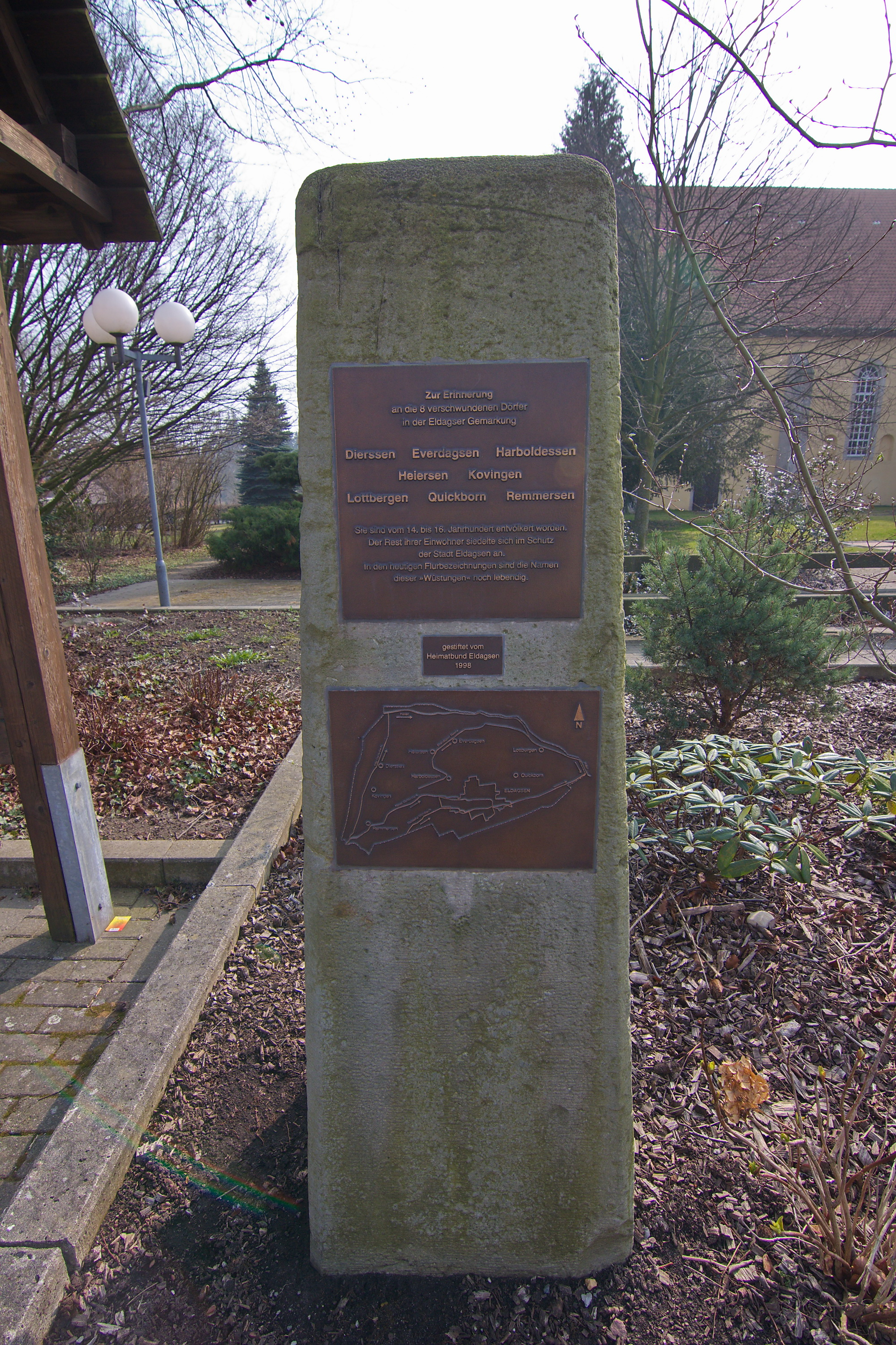 Erinnerungsmal an die 8 verschwundenen Dörfer (Wüstungen d. 14.-16. Jhd.) in der Gemarkung Eldagsen (Springe), Niedersachsen, Deutschland.